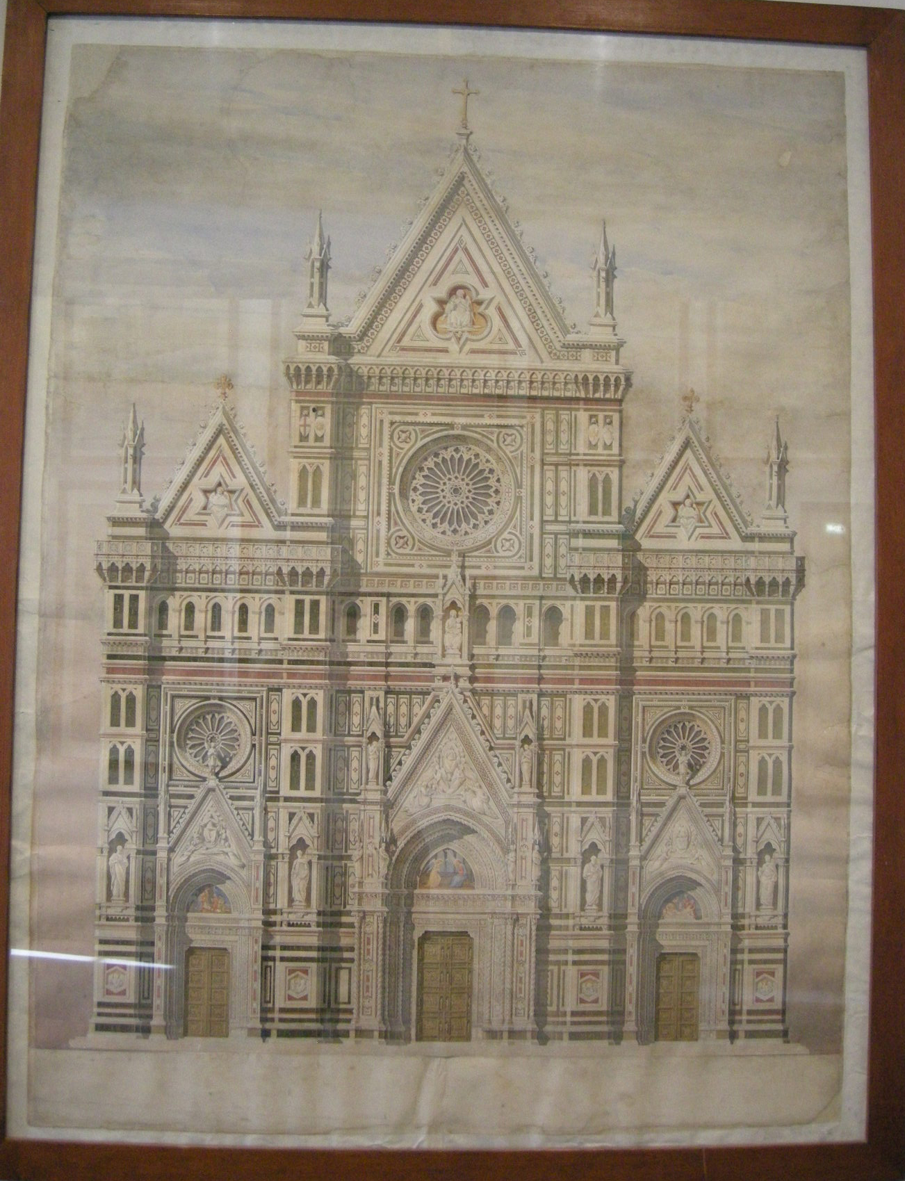 Emilio de' fabris, primo progetto per la facciata